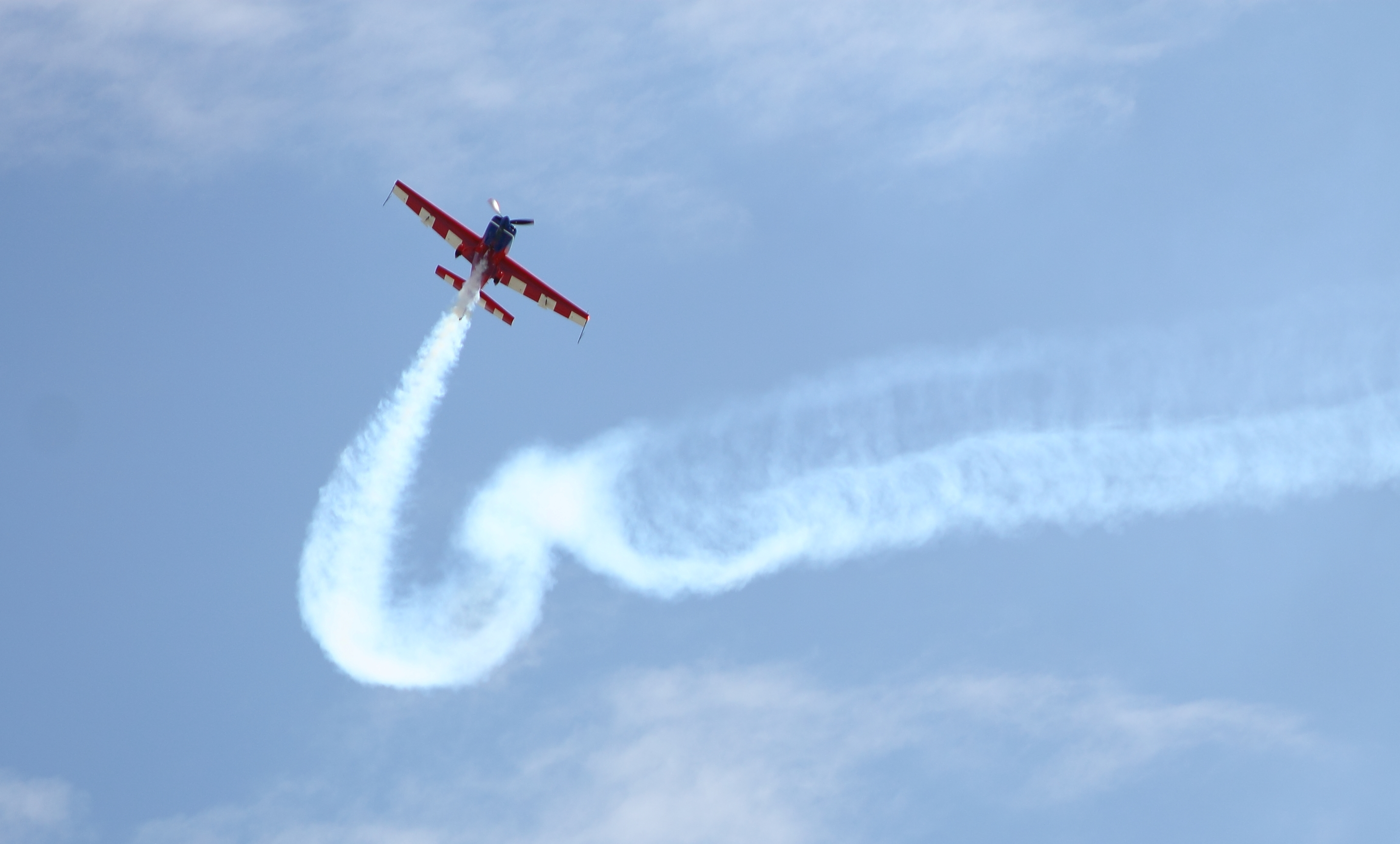 Чемпион мира по воздушной акробатике Светлана Капанина во время выступления в воздушном шоу в Сочинском Олимпийском парке.